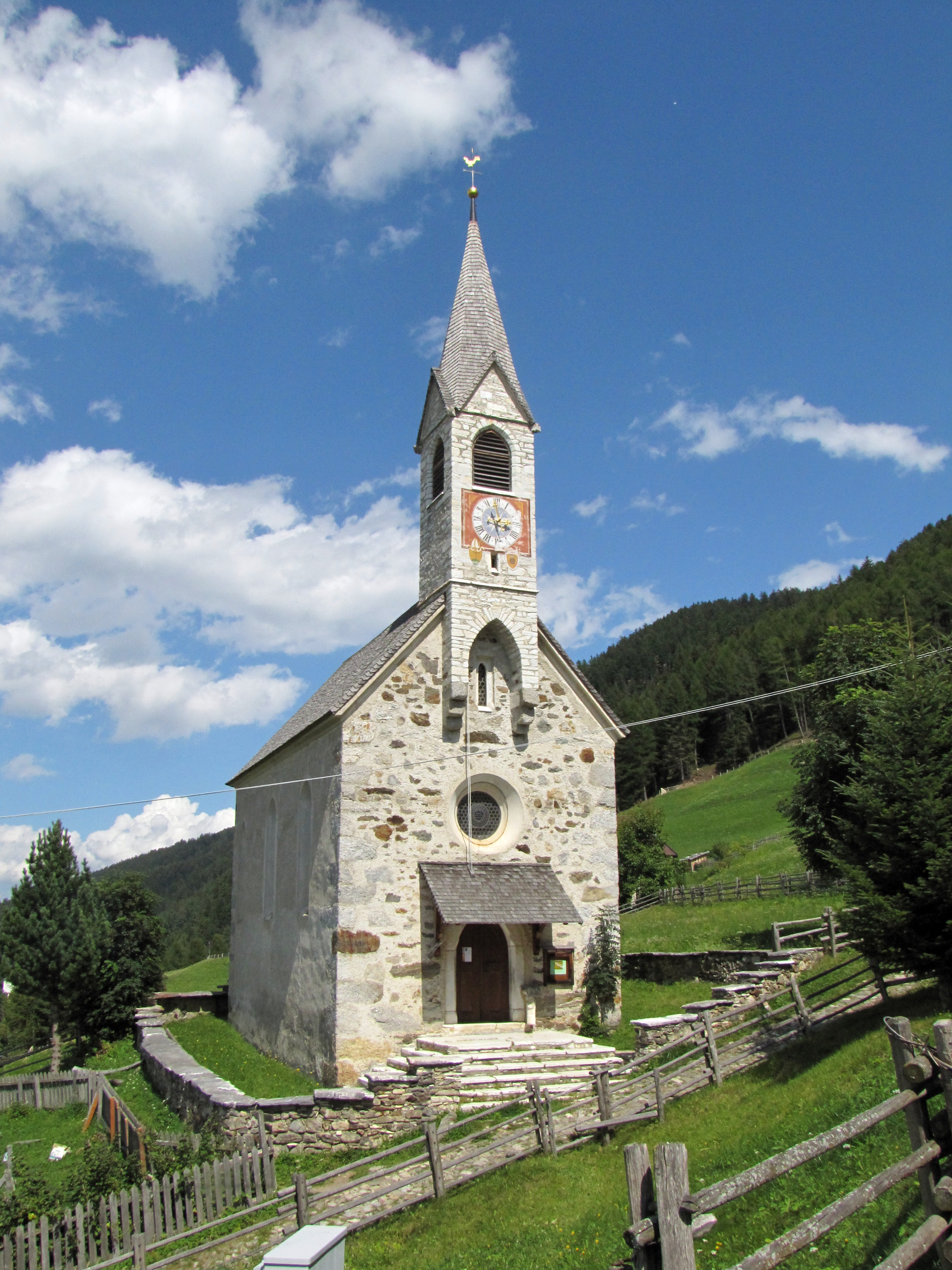 Herz-Jesu-Kirche in Aschbach